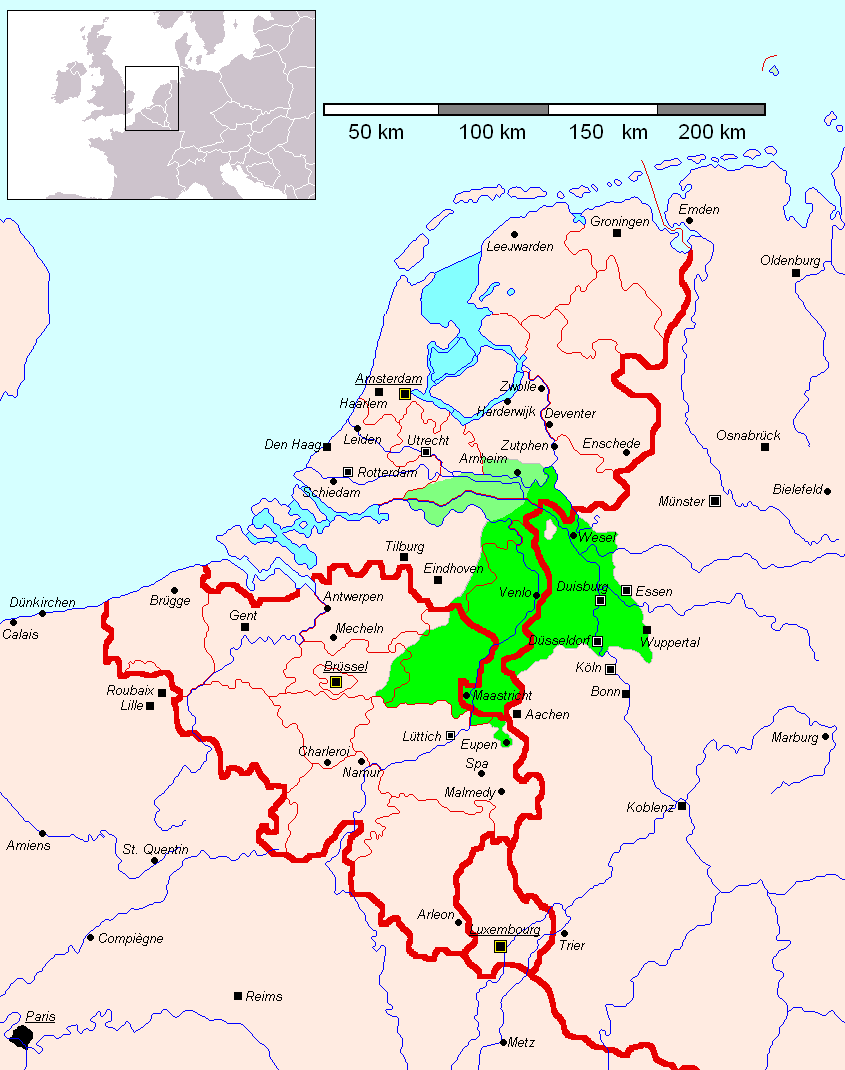 Karte mit der Lage des Rheinmaasländischen inklusive der Übergangsdialekte zum Brabantischen